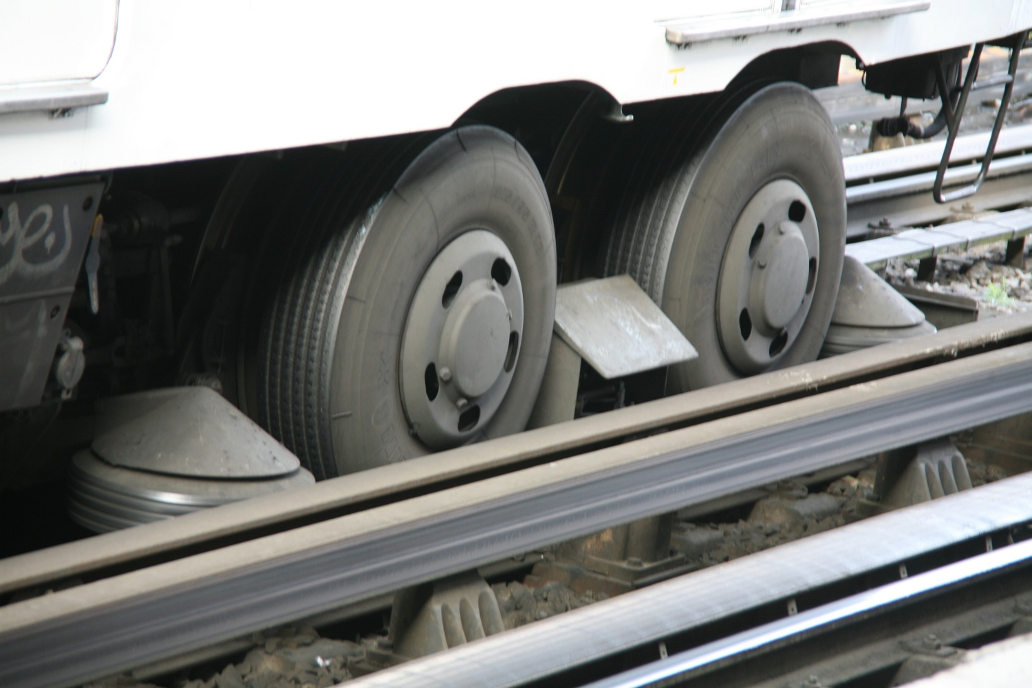 Gummibereifung der Pariser Metro, Fahrzeugtyp MP